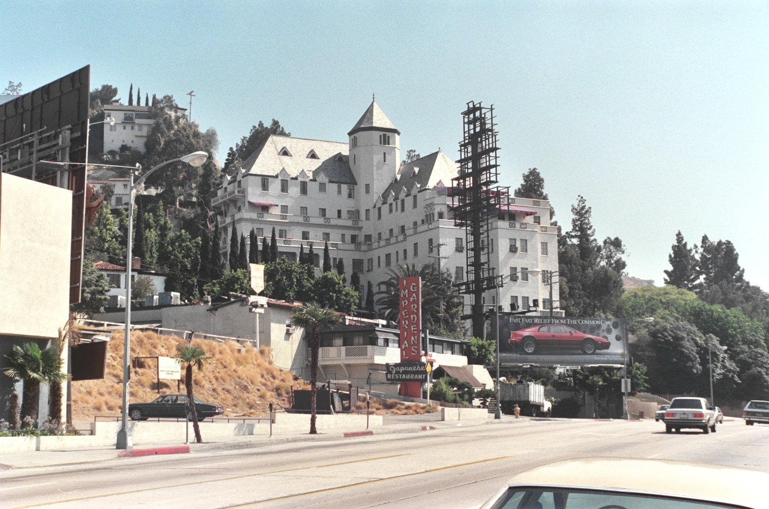 Chateau Marmont, June 1988